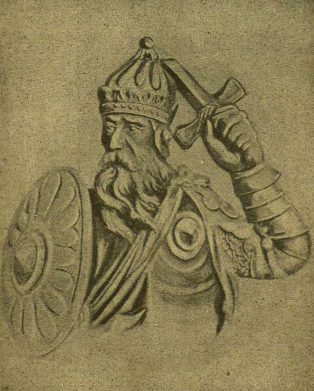 Беларуская (тарашкевіца): Партрэт караля Міндоўга